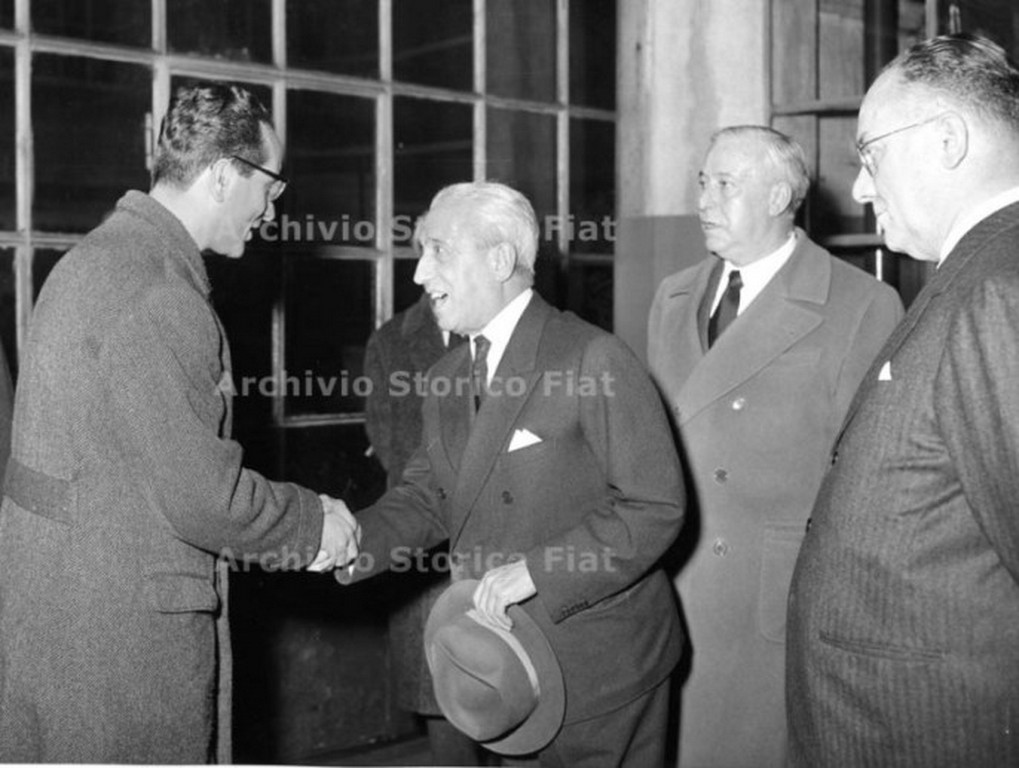 Fotografia a mezzo busto del ministro Emilio Colombo che stringe la mano al professor Vittorio Valletta, presso la sala prove della Fiat Grandi Motori, per il conferimento del premio ANIAI al motore marino 7512.S, quale migliore realizzazione di ingegneria meccanica, Torino (Fiat Group Marketing & Corporate Communication spa, Archivio e centro storico Fiat, Archivio iconografico, Premiazioni, b. PR 12)